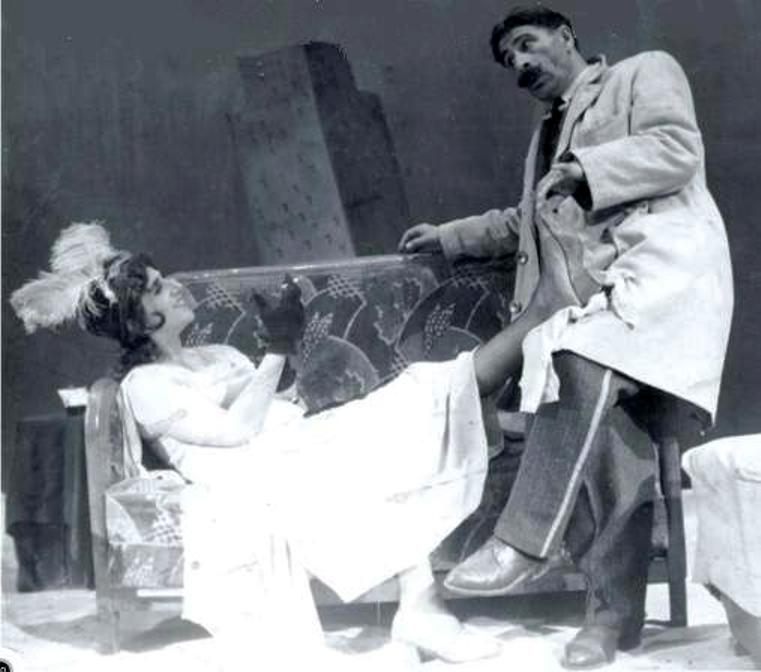 Qefsere Trako ne rol